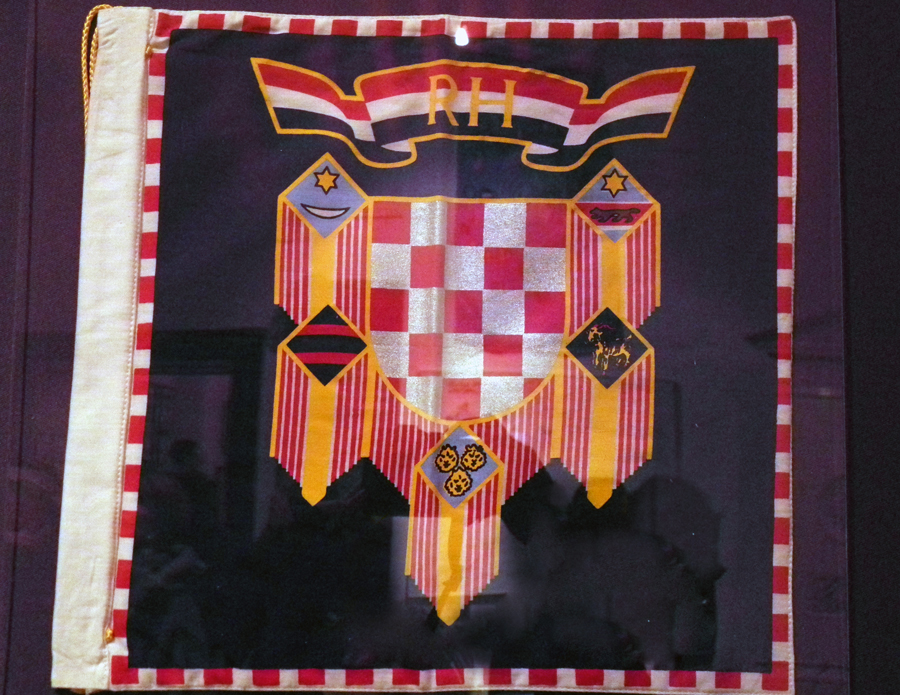 Izložba Domovinski rat u Hrvatskom povijesnom muzeju tijekom Noći muzeja.